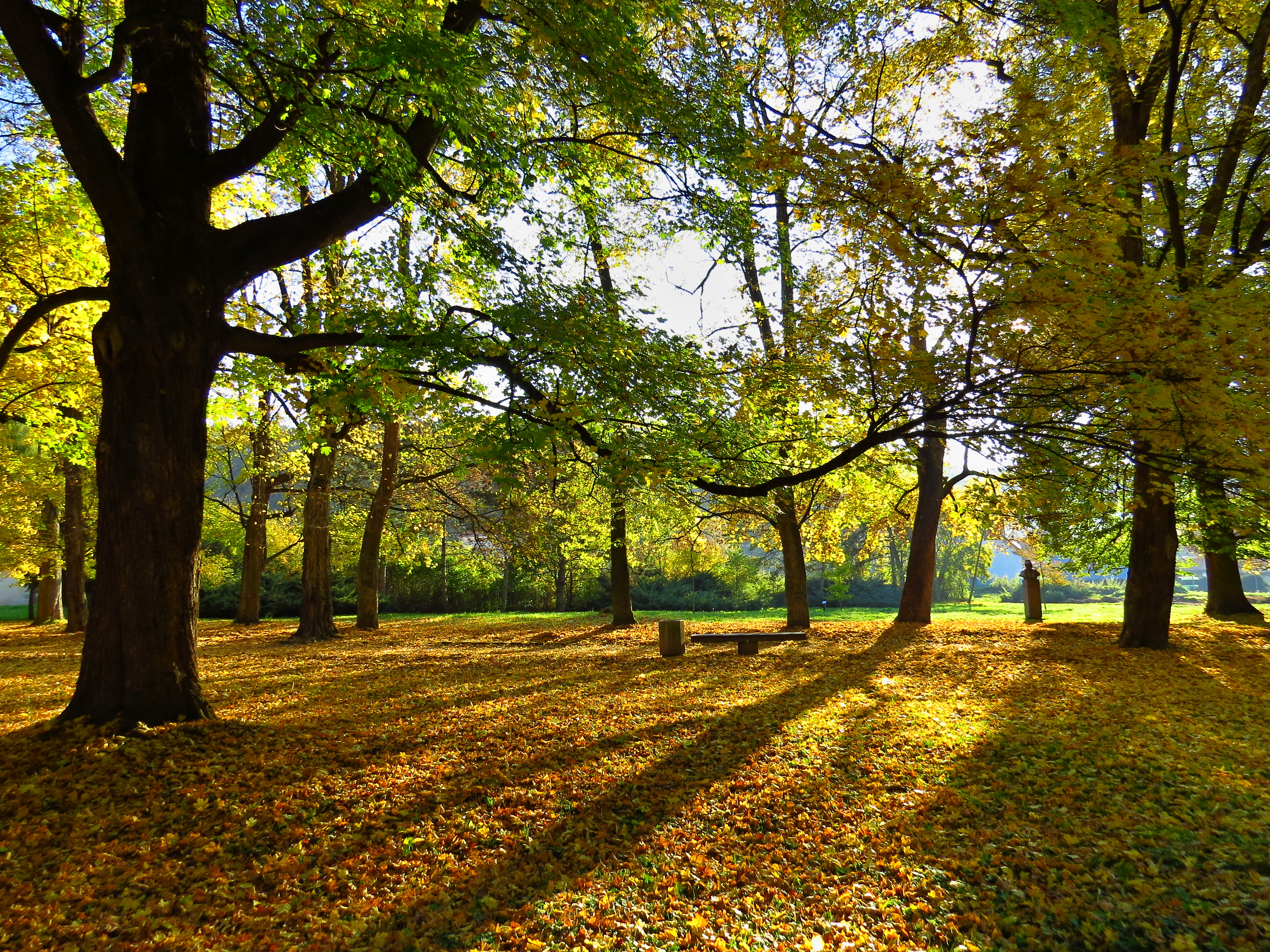 Brodziansky park